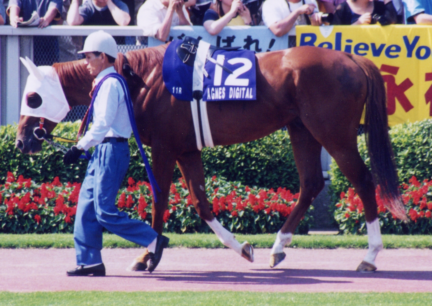 Agnes Digital